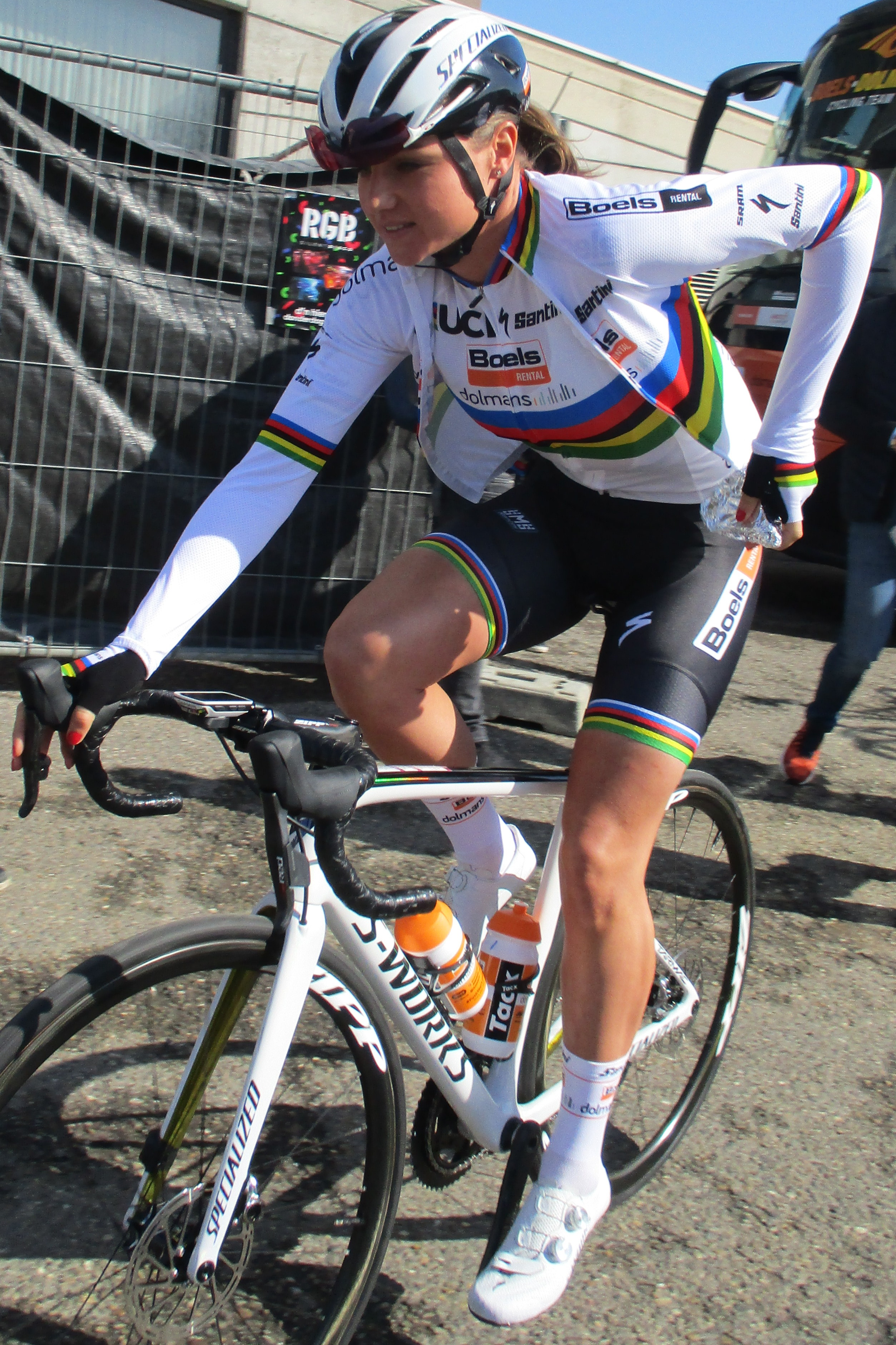 Start van de Amstel Gold Race Ladies Edition 2018 in Maastricht.